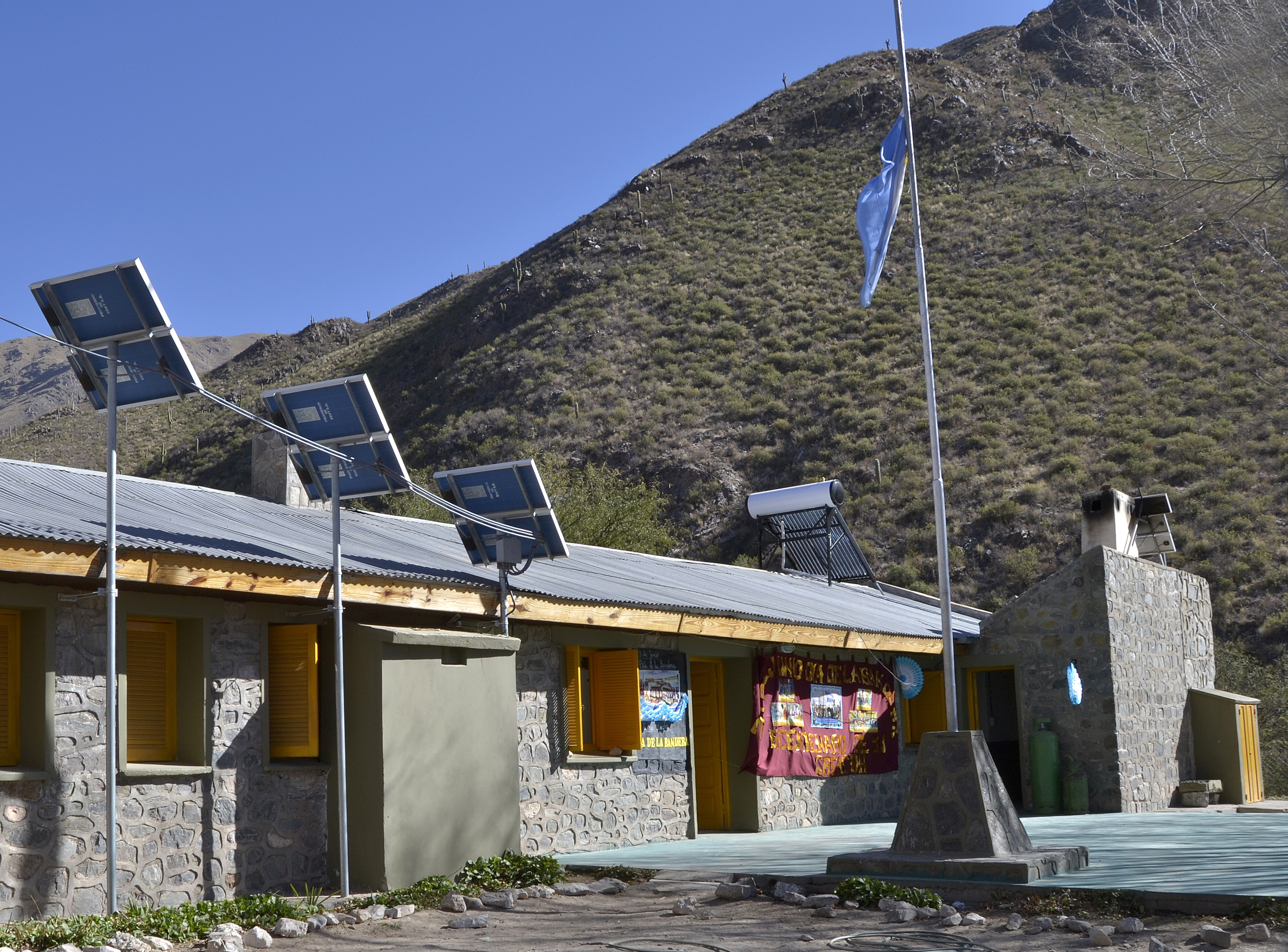 Paneles fotovoltaicos instalados en una escuela rural en Argentina a partir del programa PERMER - Proyecto de Energías Renovables en el Mercado Rural